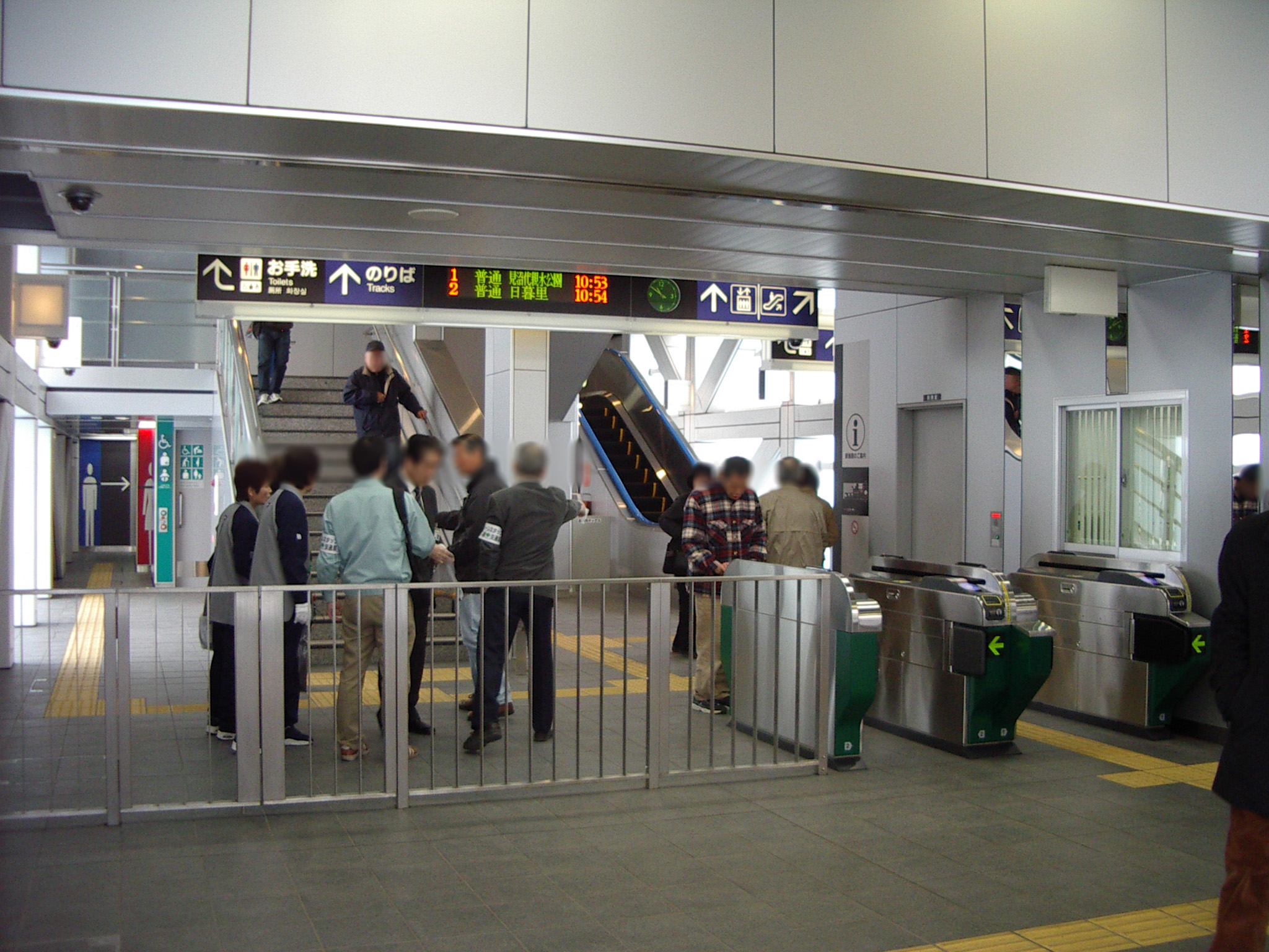 日暮里・舎人ライナー西新井大師西駅